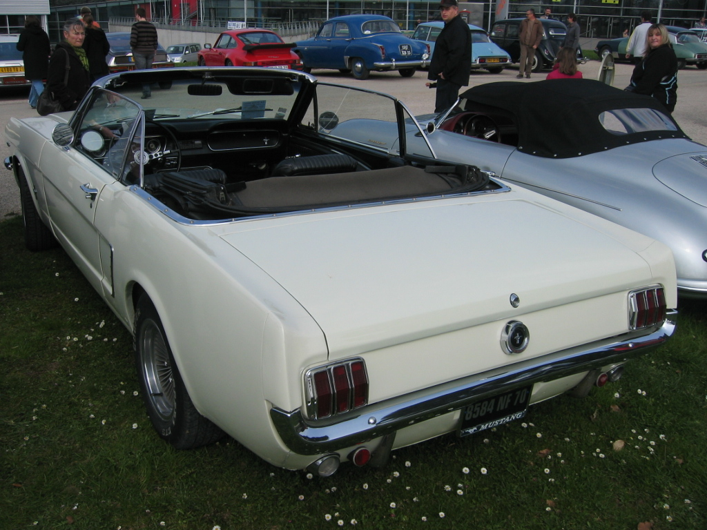 Ford Mustang